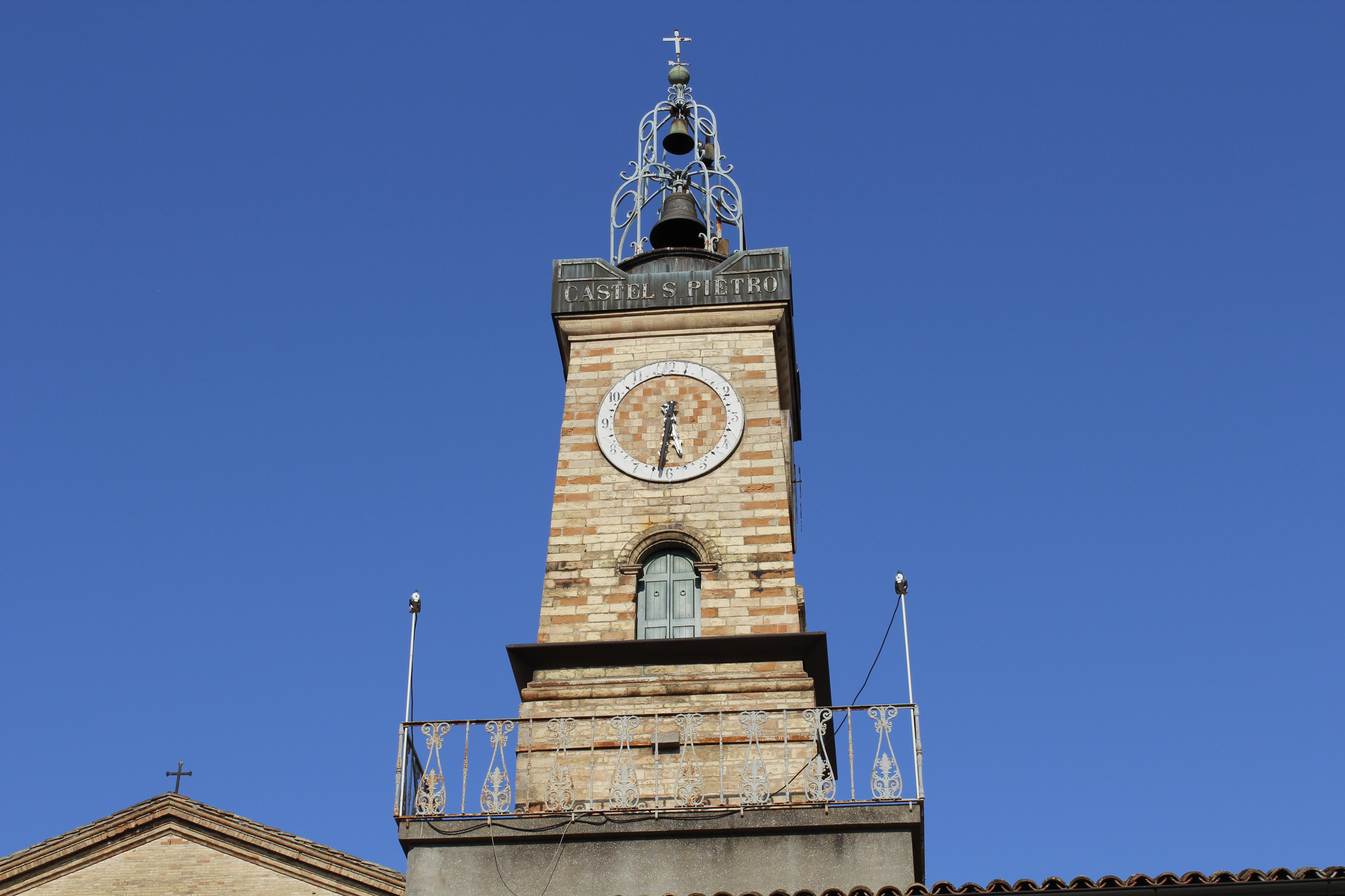 Campanile presso San Rocco, Ravenna